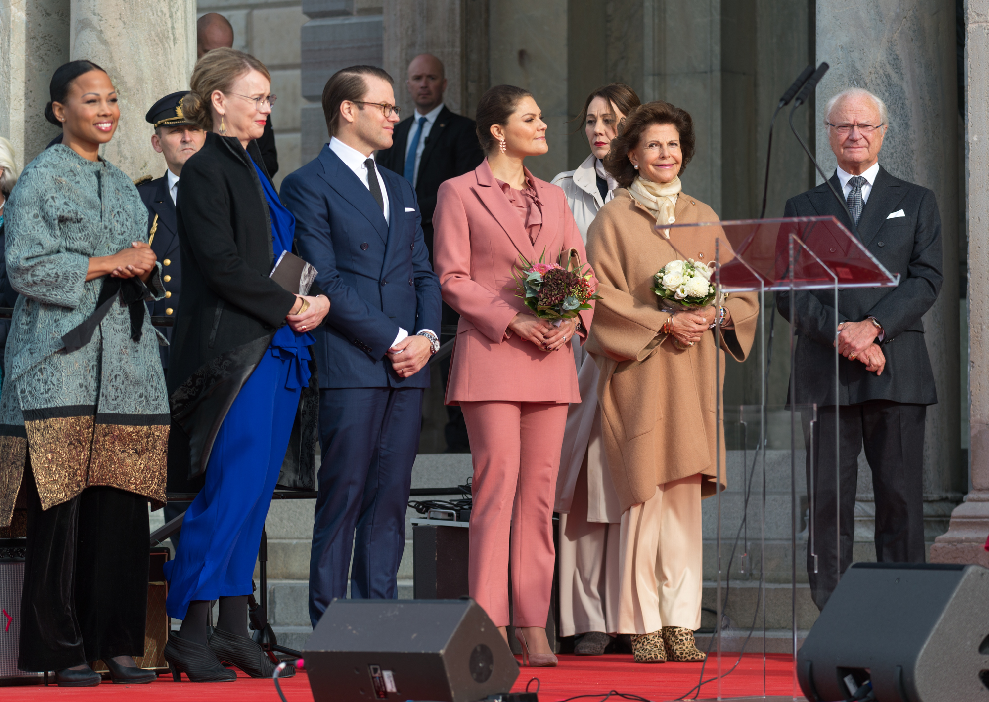 HM Konungen nyinviger Nationalmuseum i Stockholm 2018 i närvaro av HM Drottningen, HKH Kronprinsessan och HKH Prins Daniel, kulturminister Alice Bah Kuhnke, överintendent Susanna Pettersson.